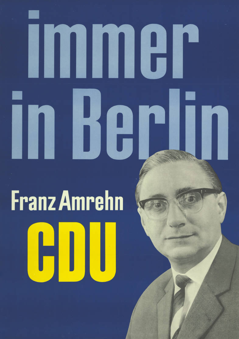 Immer in Berlin Franz Amrehn CDU Abbildung: Porträtfoto Plakatart: Kandidaten-/Personenplakat mit Porträt Objekt-Signatur: 10-004 : 253 Bestand: Plakate zu Abgeordnetenhauswahlen Berlin (10-004) GliederungBestand10-18: Plakate zu Abgeordnetenhauswahlen Berlin (10-004) » CDU Lizenz: KAS/ACDP 10-004 : 253 CC-BY-SA 3.0 DE